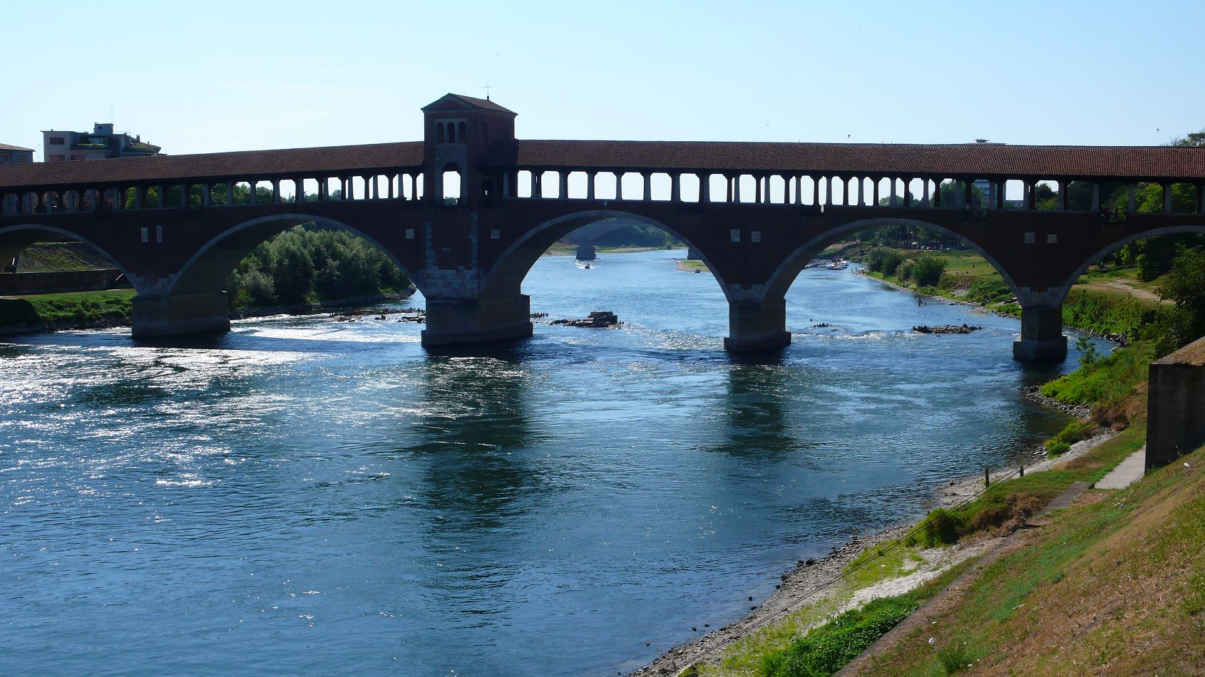 Pavia, Ponte Coperto